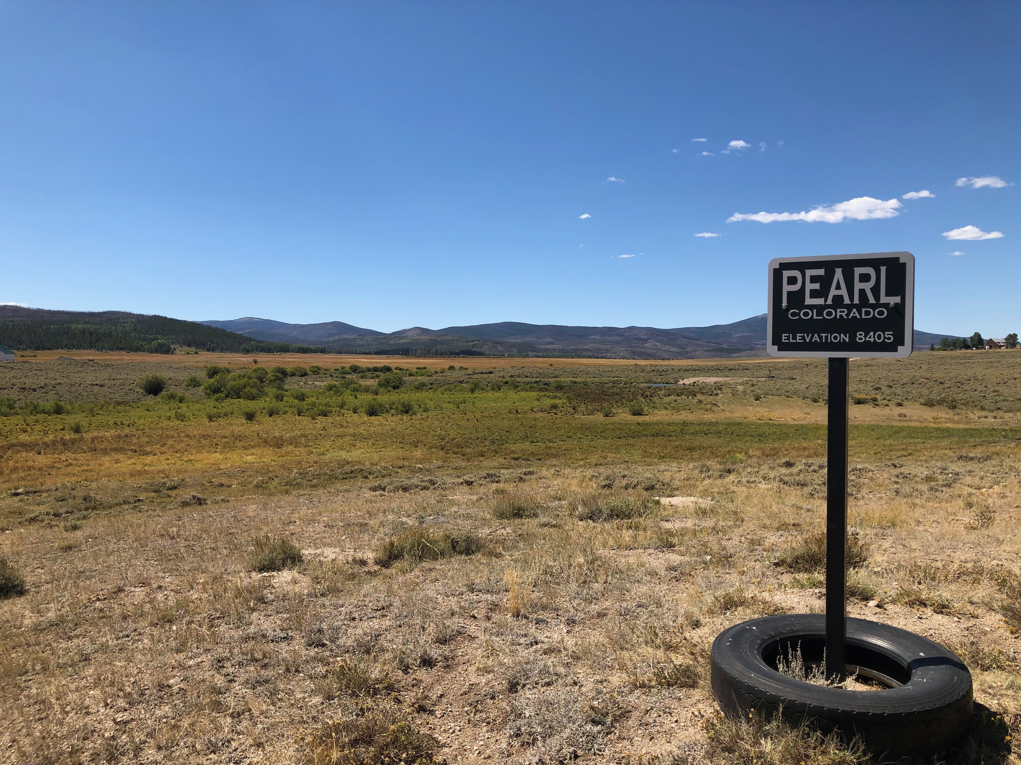 Pearl, Colorado